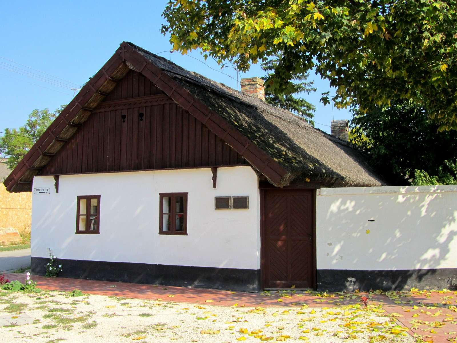 Halászház (Csongrád, Gyökér u. 1.) This is a photo of a monument in Hungary. Identifier: 17255